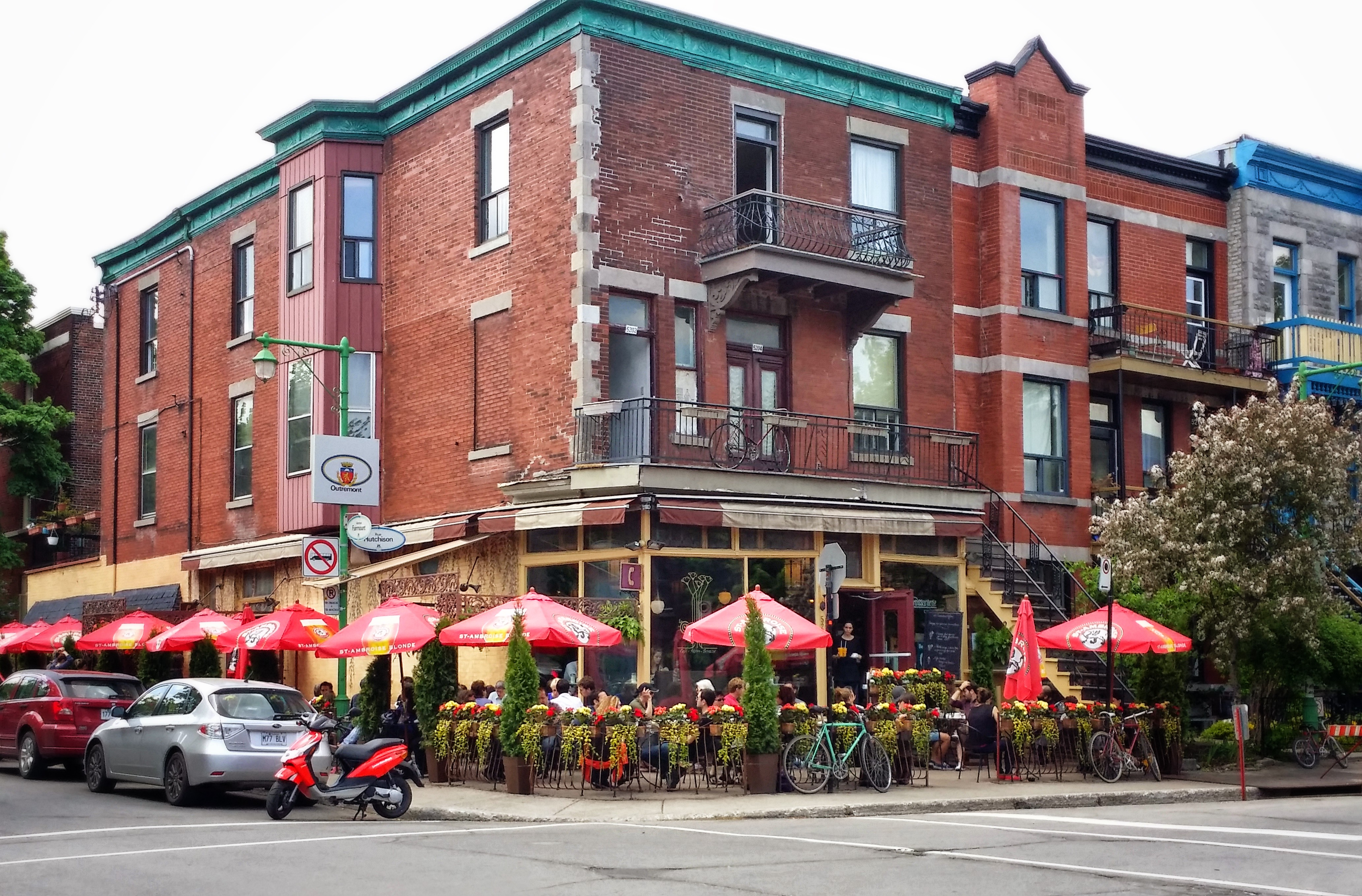 Brika trietaĝa domo kun kafejo en stratangulo.